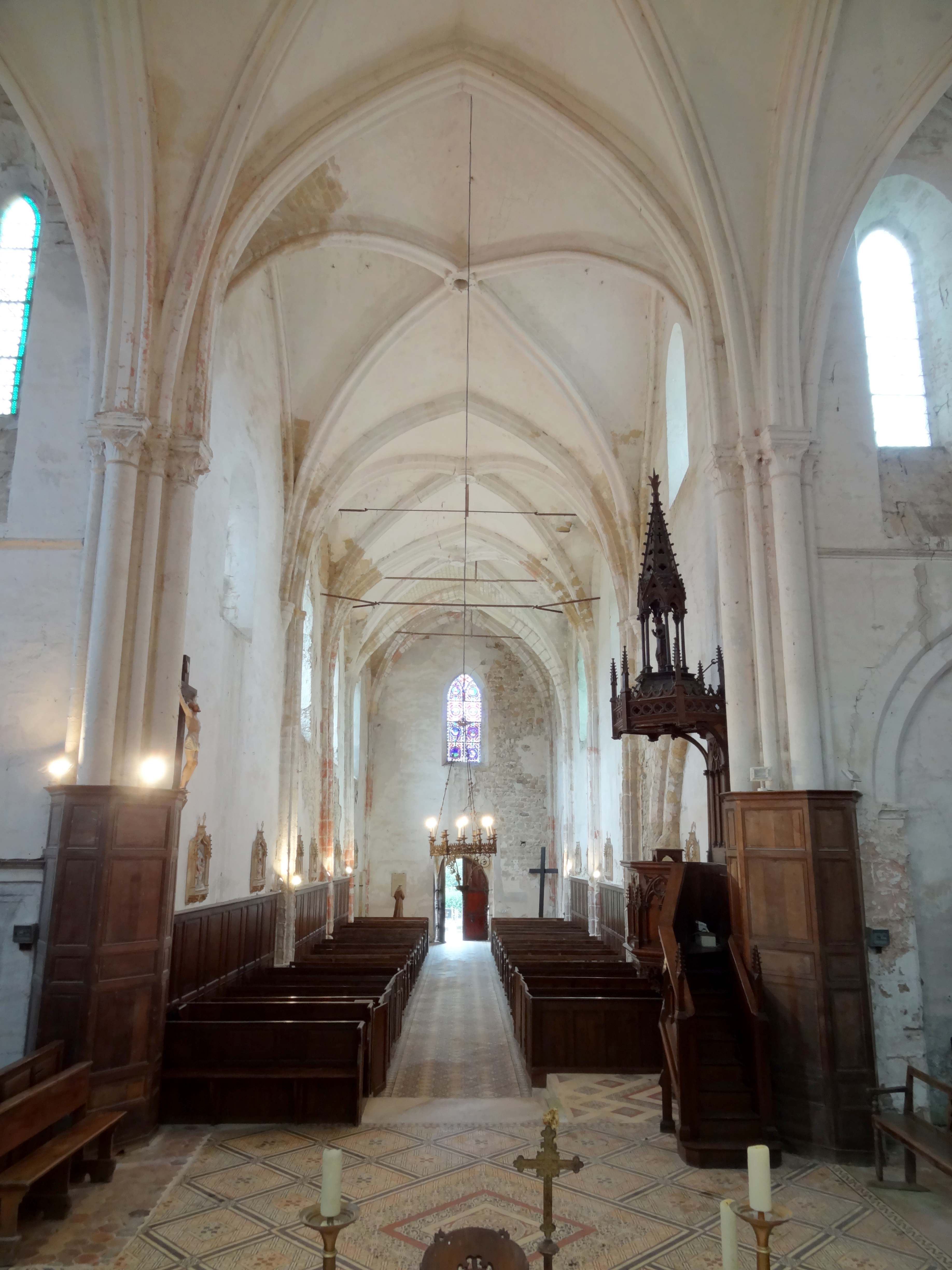 Intérieur de l'église - voir titre.